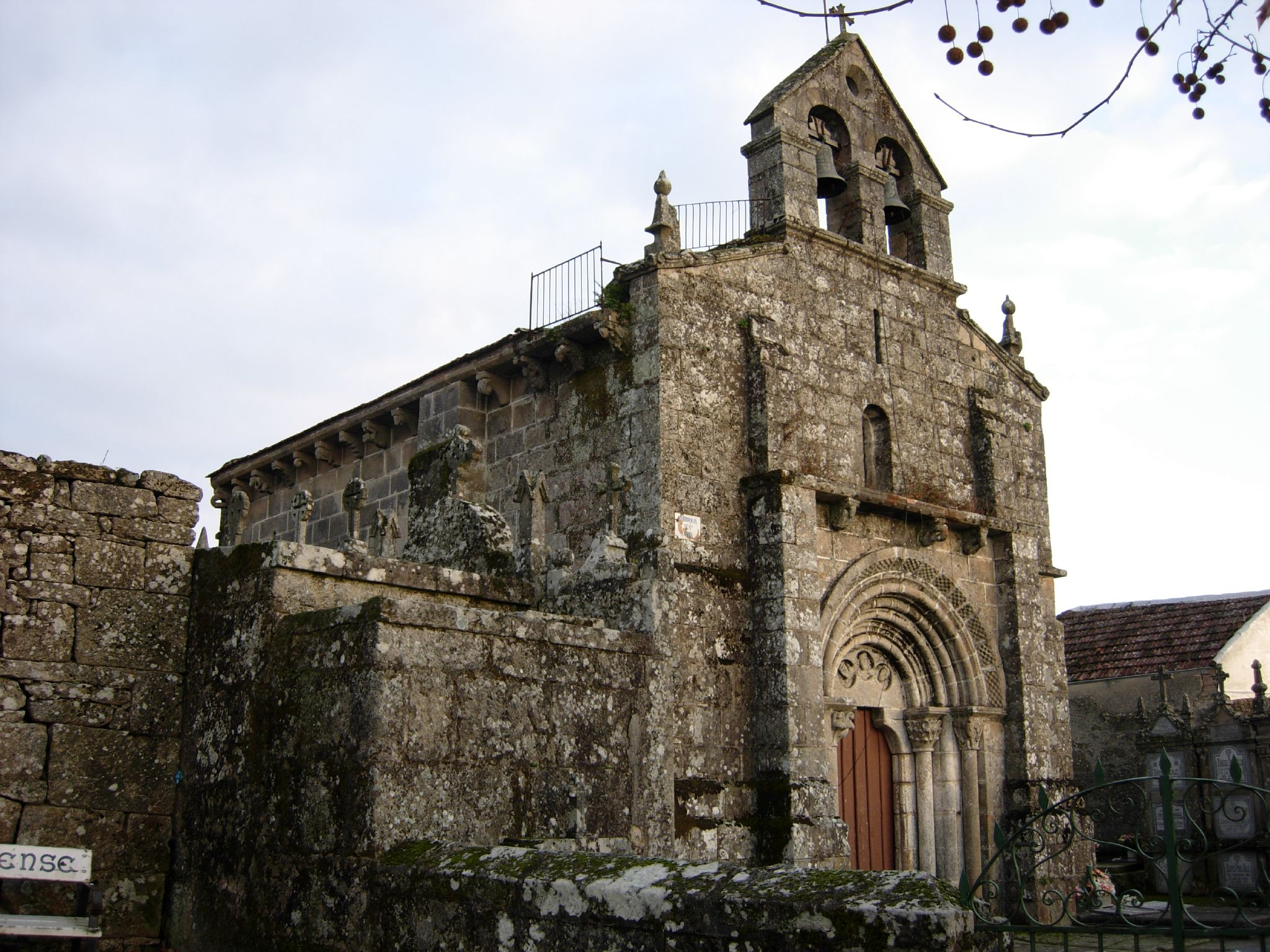 Igrexa de Santa Comba de Trevoedo, Maside, Galiza. Igrexa románica de nave única e ábsida rectangular.